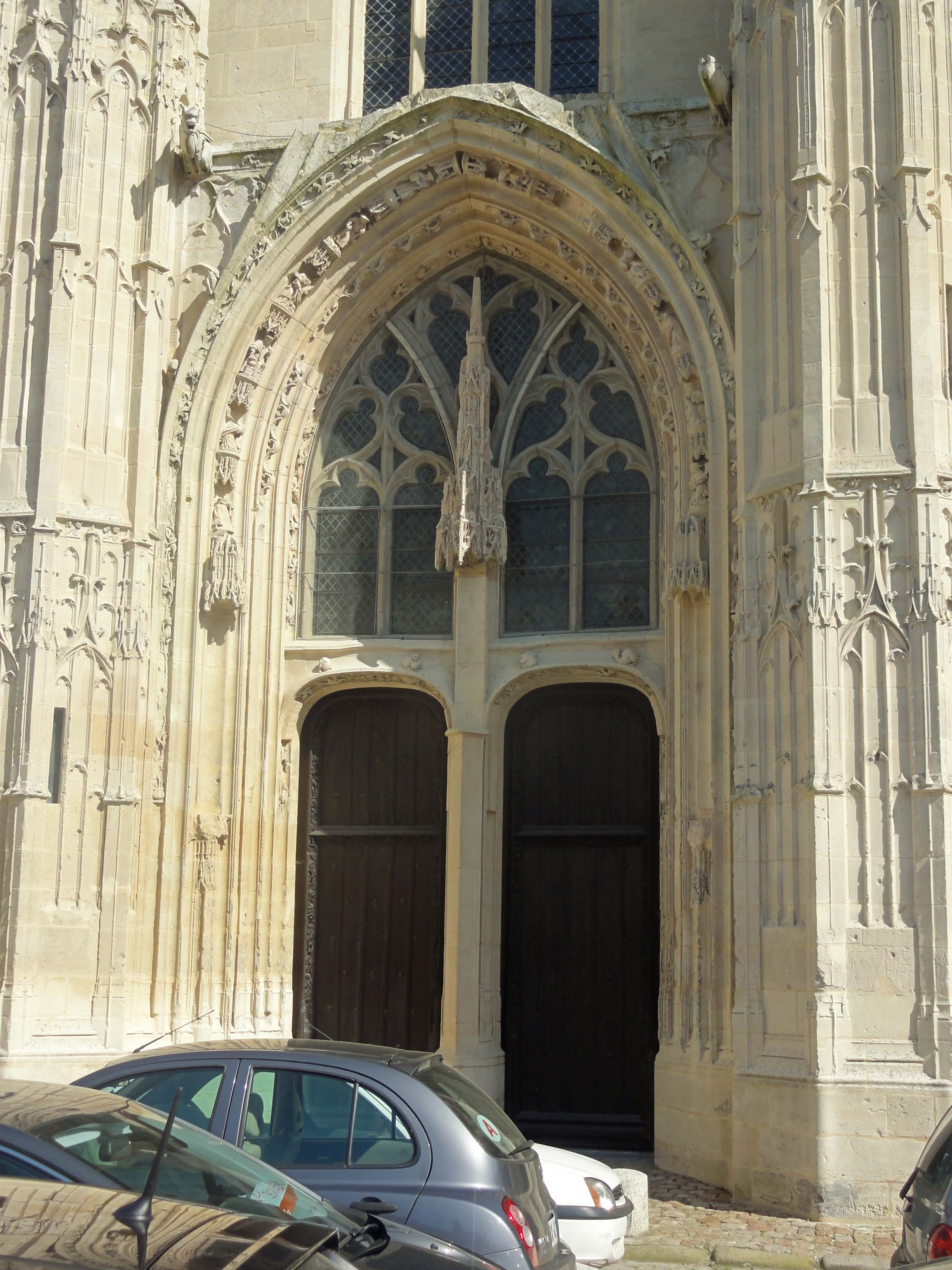 Église Saint-Pierre de Senlis - voir le titre du fichier.